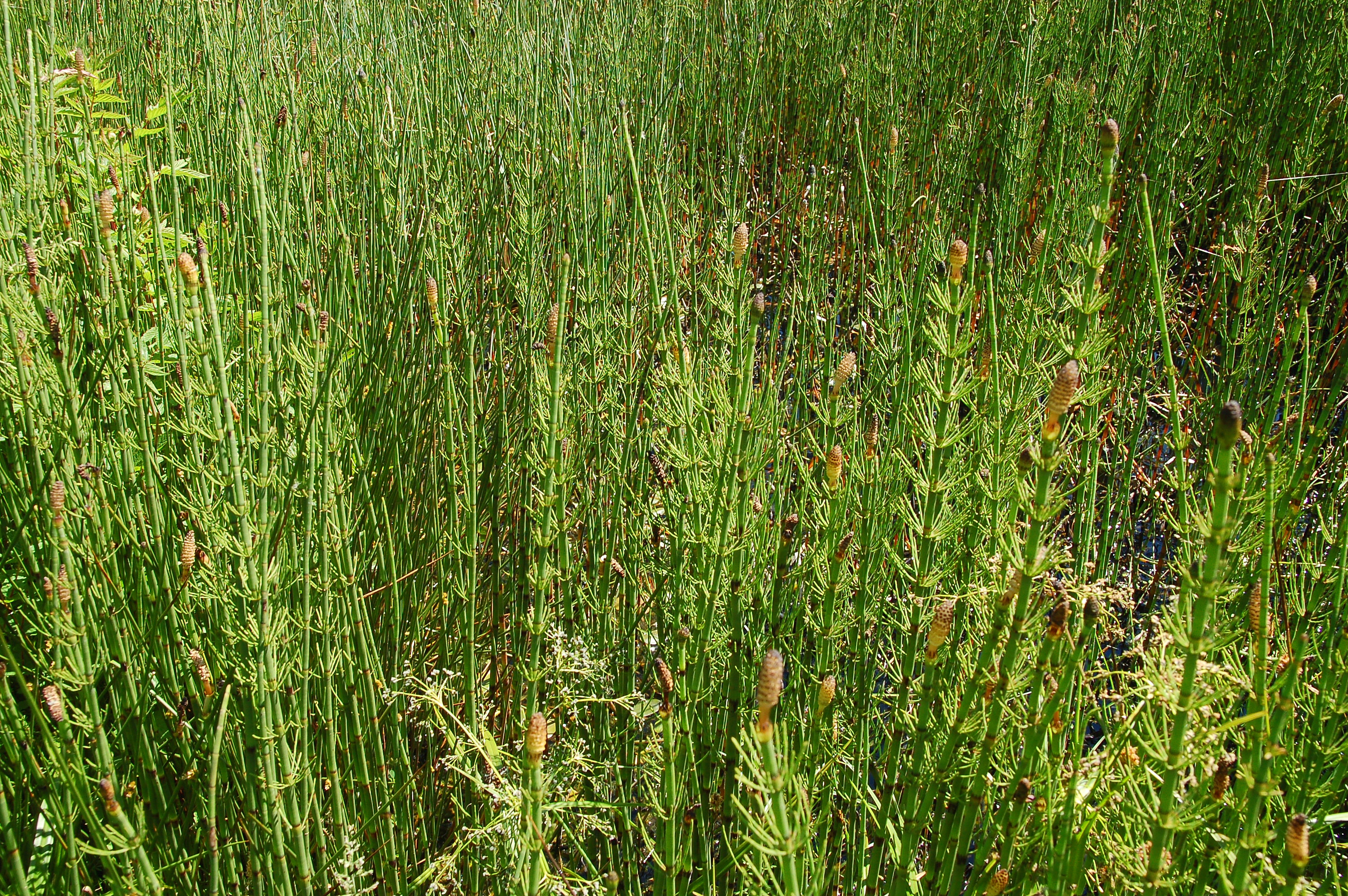 Equisetum palustre. Belgium - Ciney (Chapois) natural reserve Marie Mouchon.